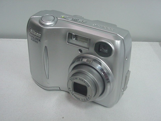 Appareil photographique numérique Nikon Coolpix 2200 - Vue générale